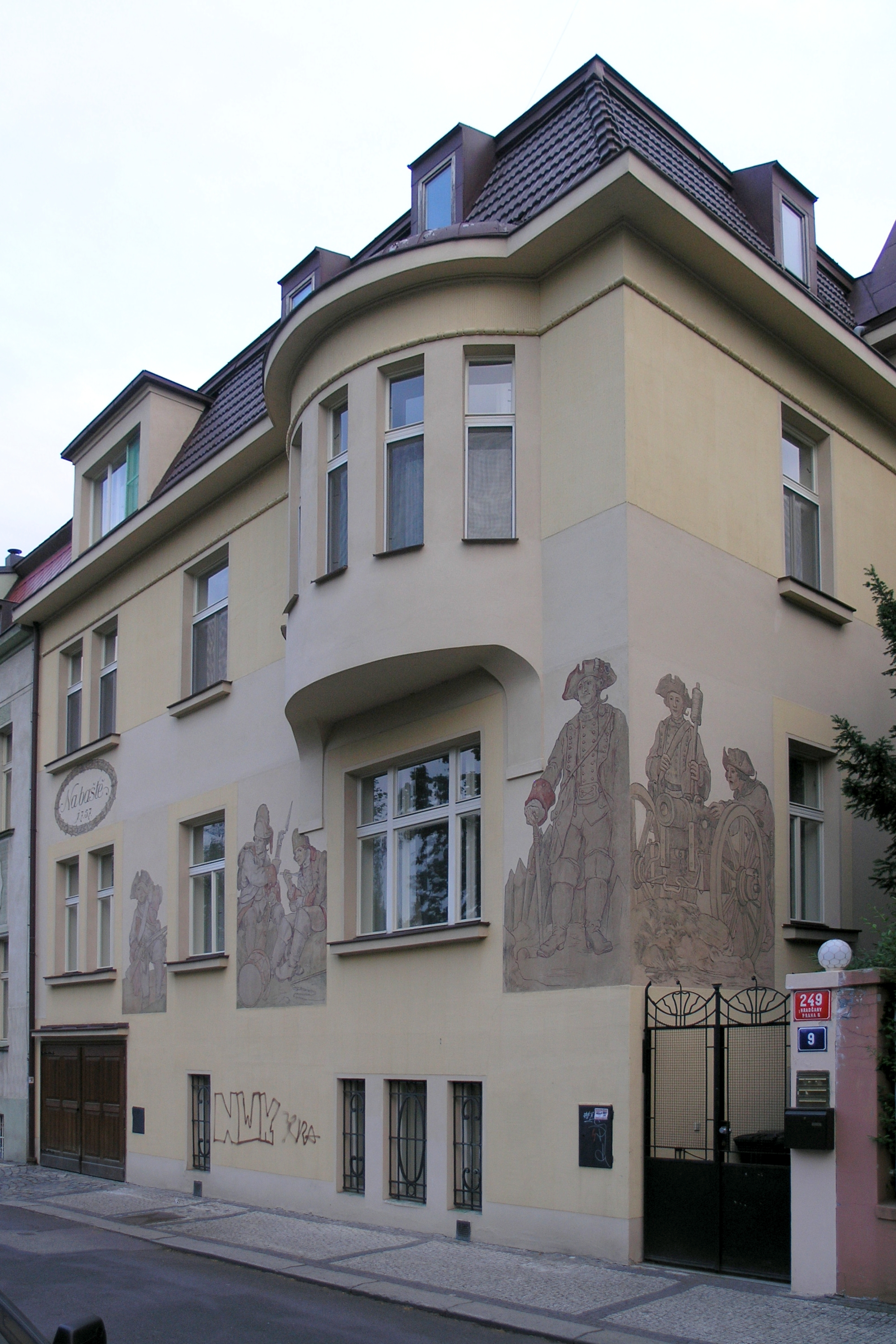 Praha, Hradčany - ulice Na Baště sv. Ludmily 9/249